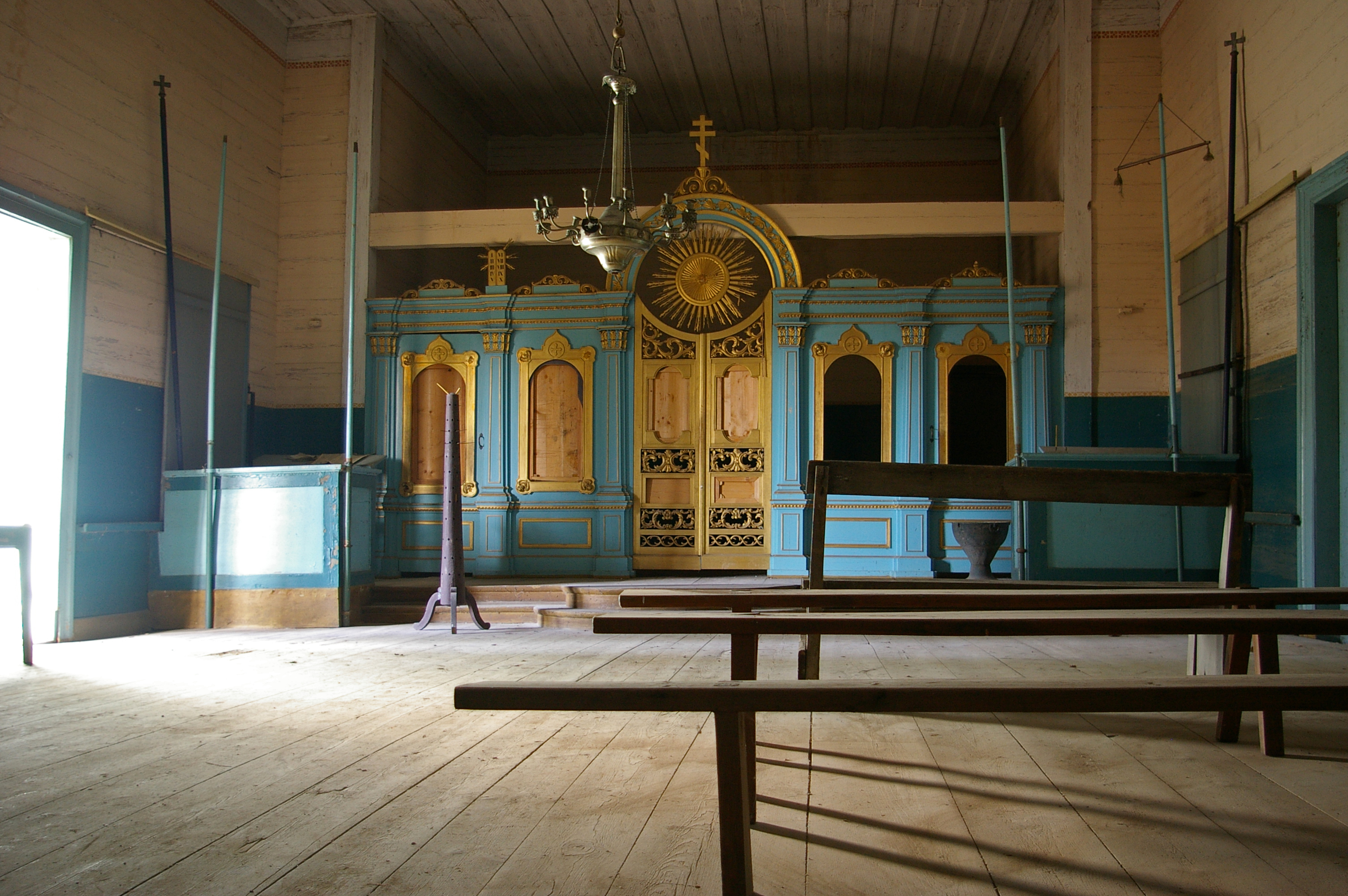 Laanemetsa Peeter-Pauli kirik